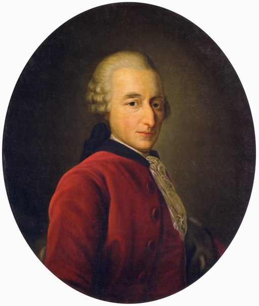 Fürst Dimitij Jurewitsch Trubezkoj (ca. 1724—1792), Hauptmann-Porutschik der Garde.